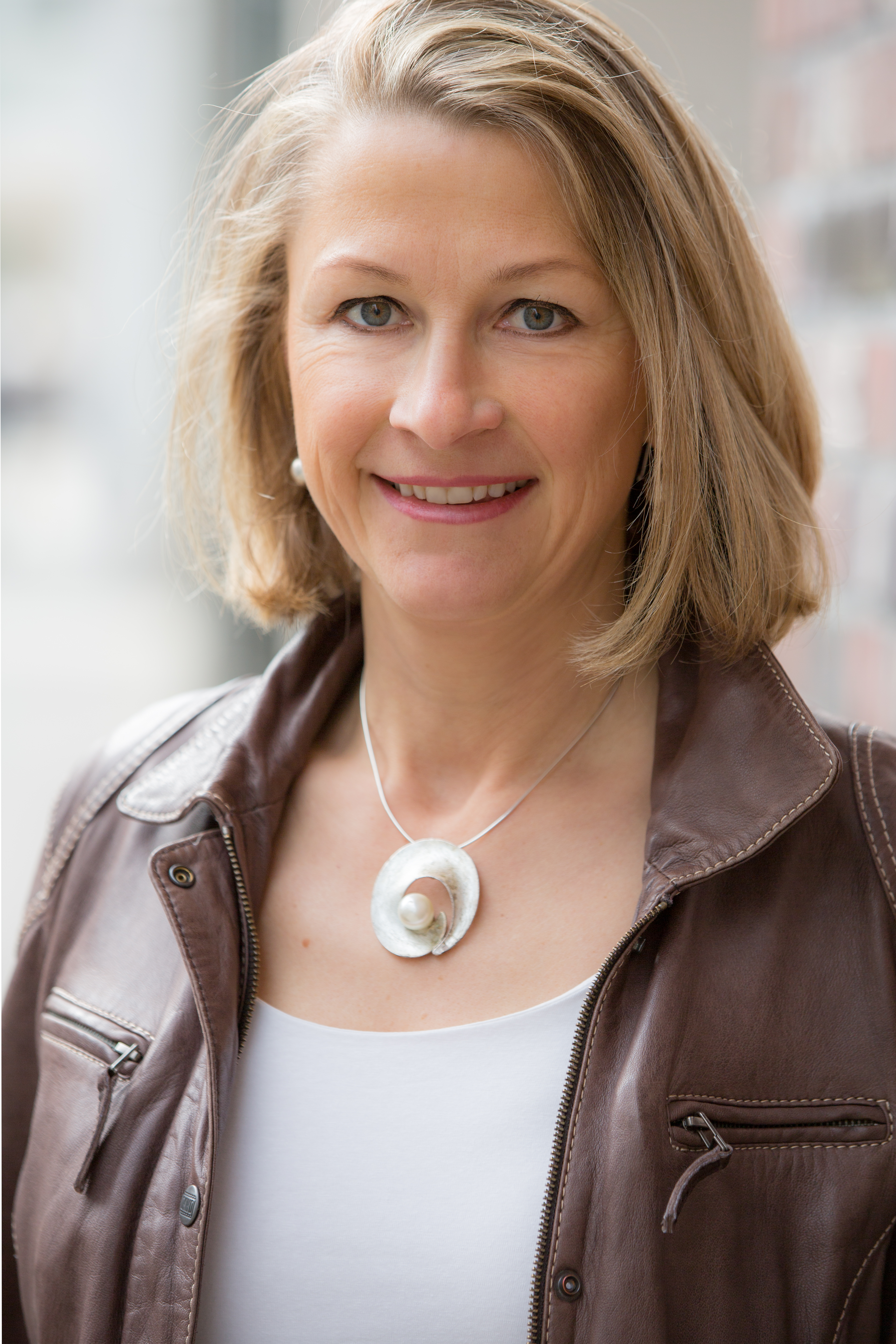 © Helge Mundt